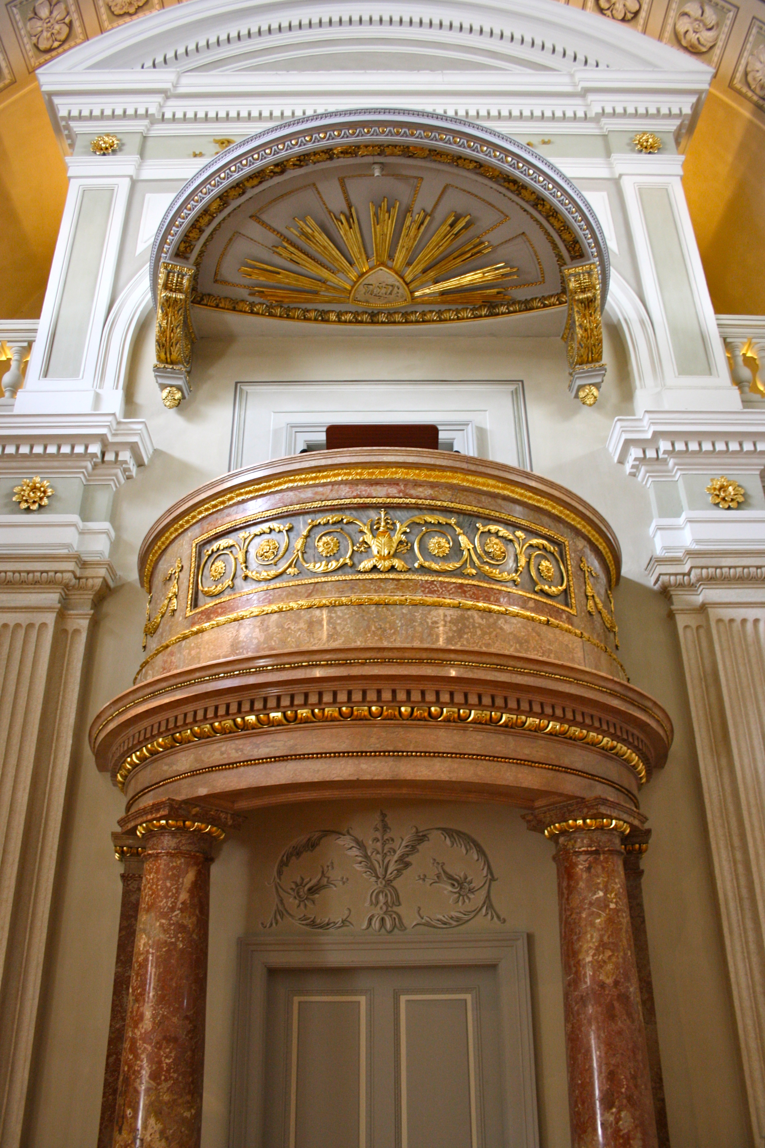 Kanzel der Reformierten Stadtkirche in Wien.